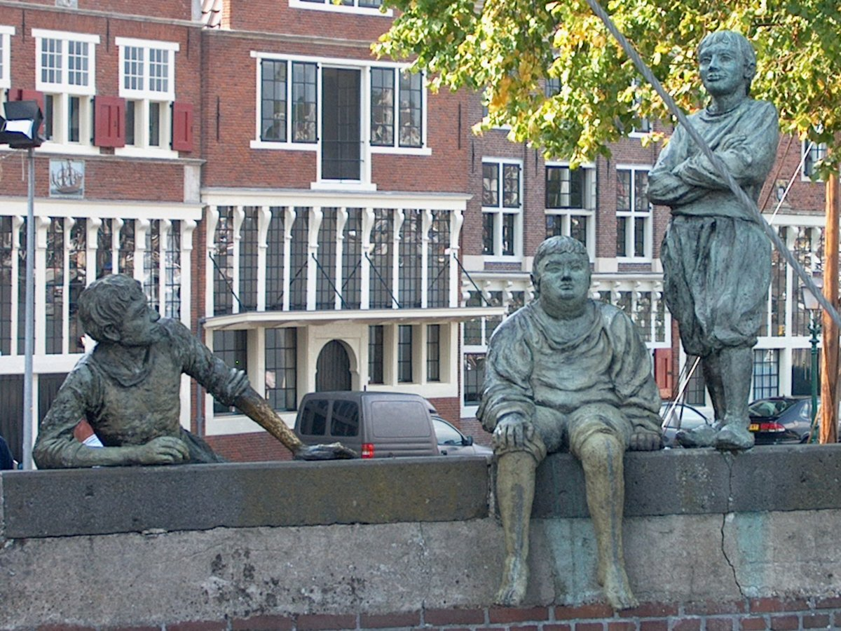 Standbeelden "Scheepsjongens van Bontekoe" - Hoorn, by Jan van Druten made in 1968